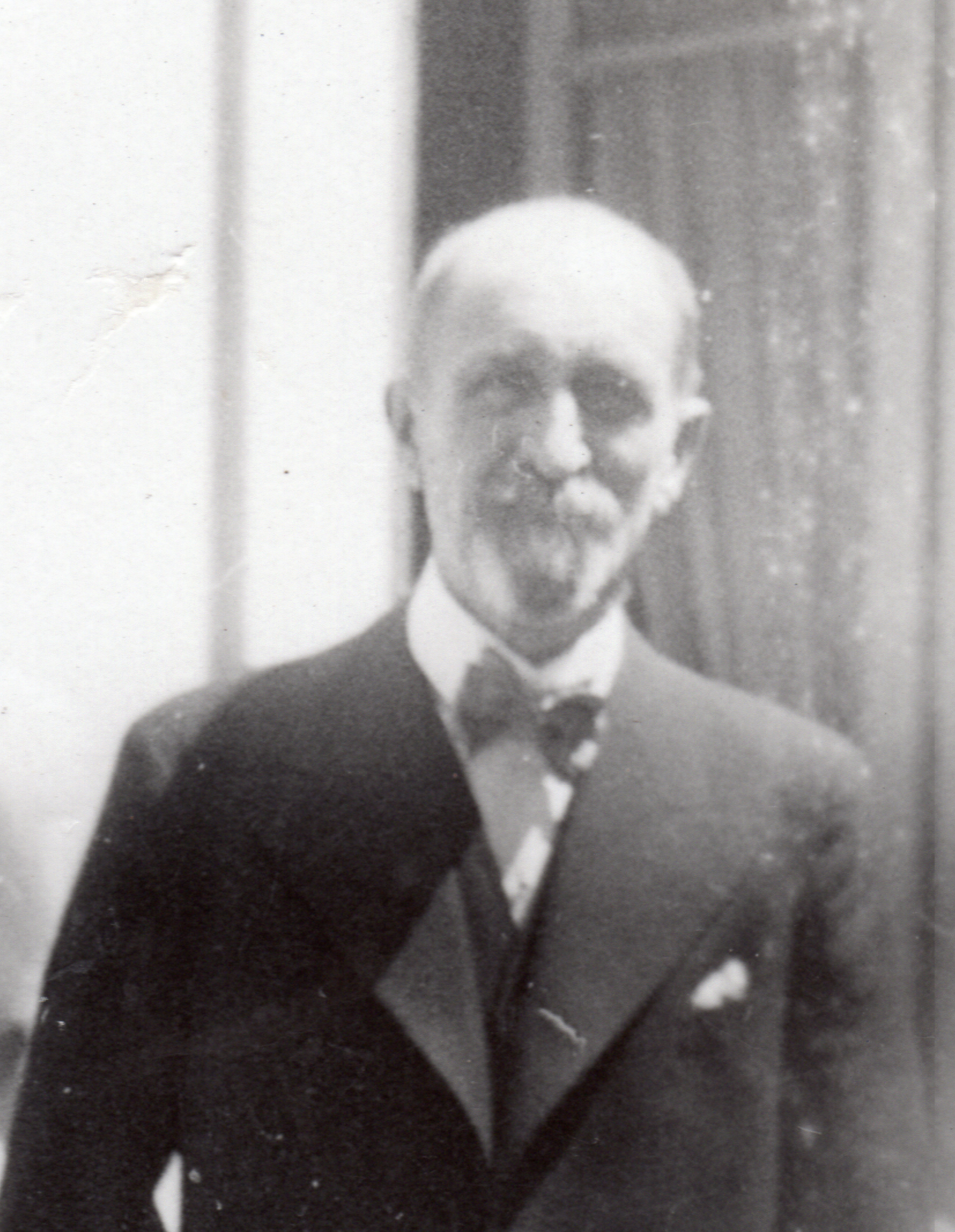 photo portrait artiste peintre décorateur